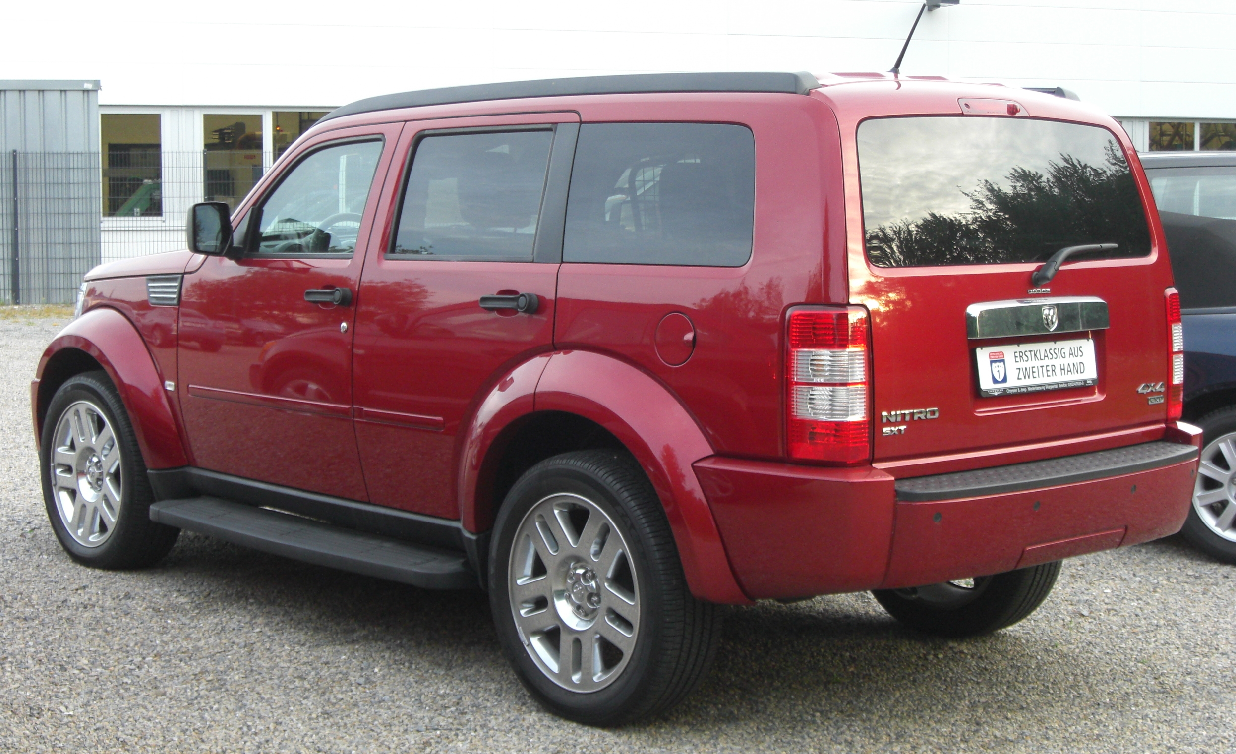 Dodge Nitro